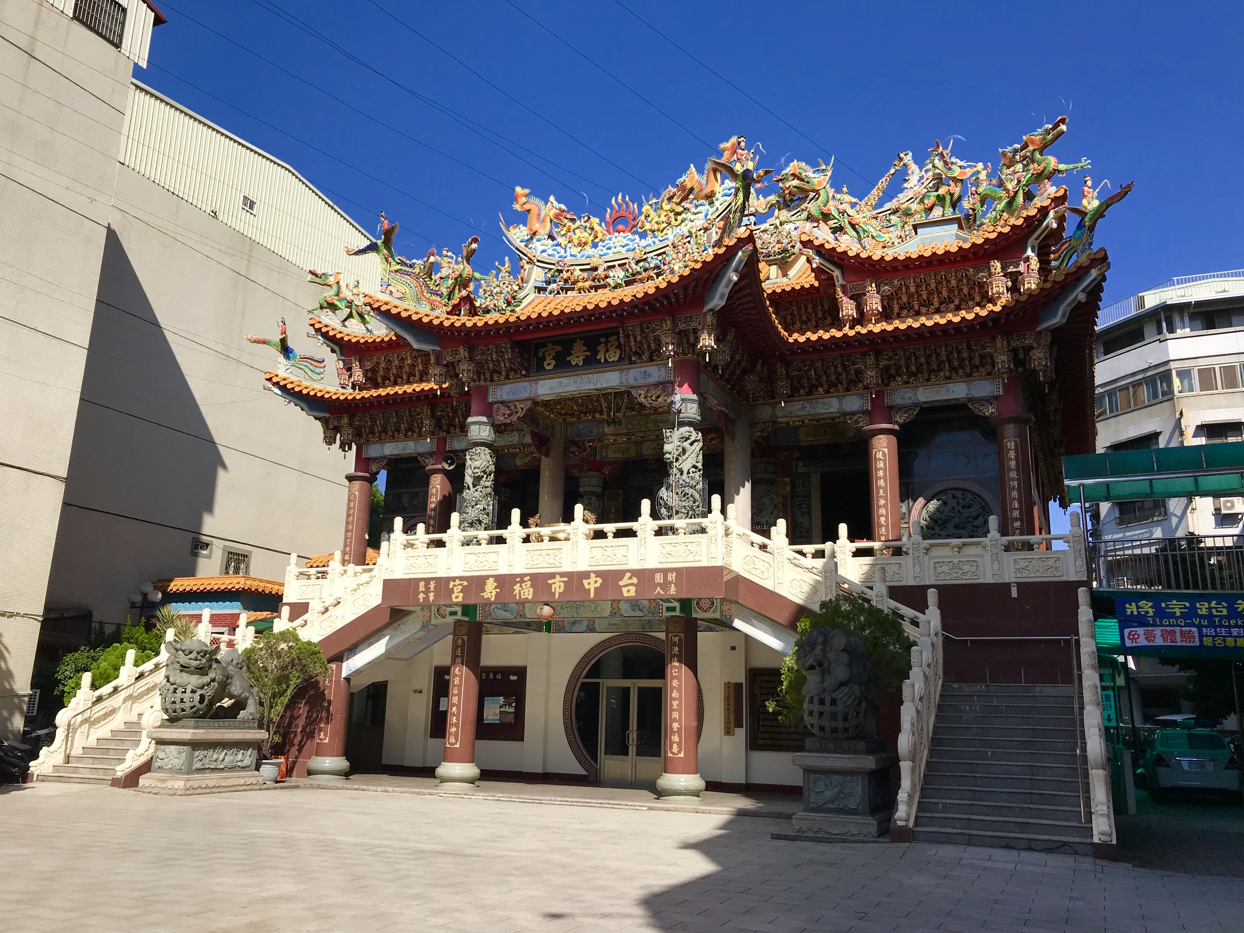 何厝庄福壽宮斜照